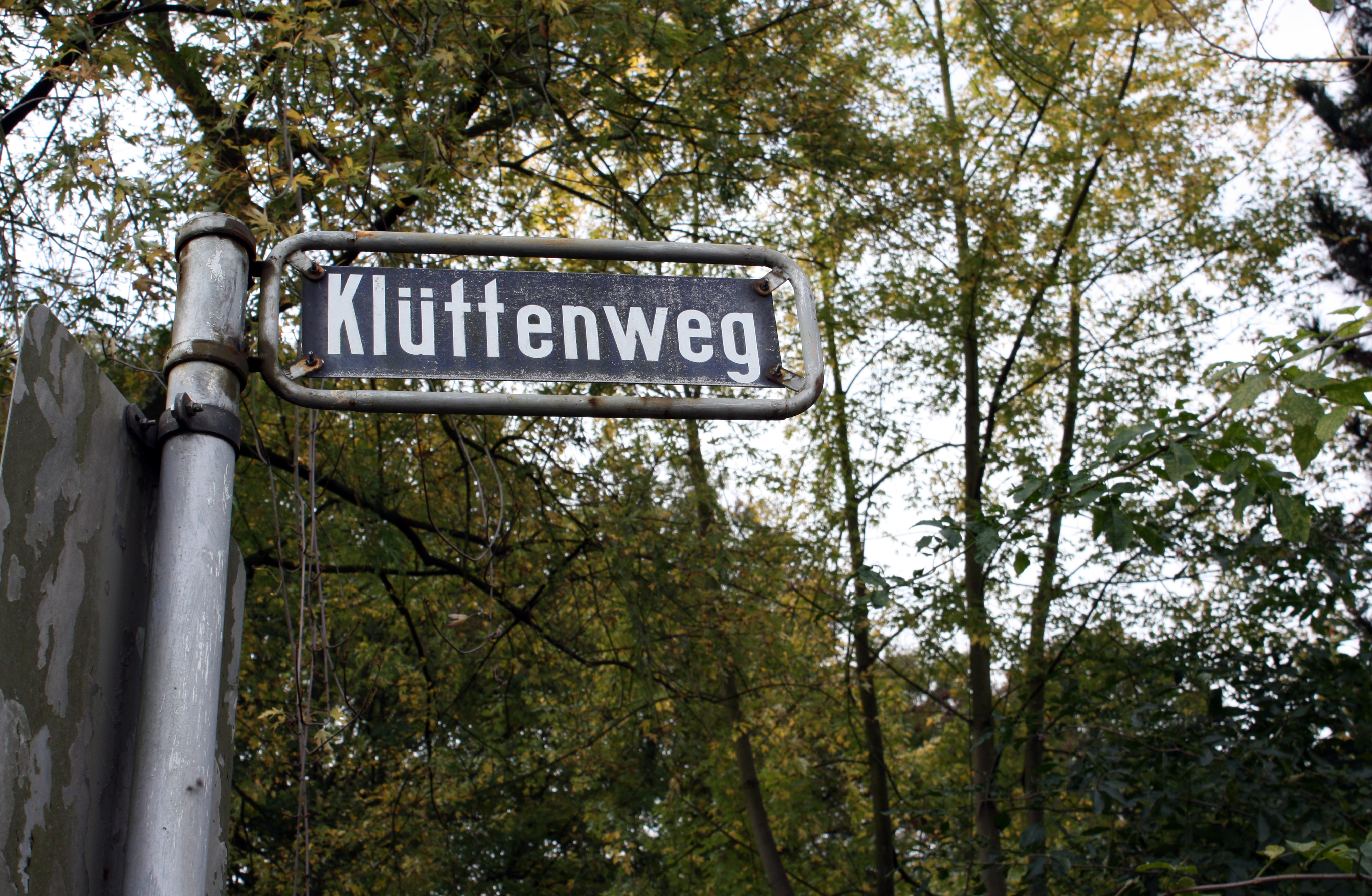 Hürth, der Klüttenweg erinnert an den Tagebau "Hürtherberg" und die Brikettfabrikation